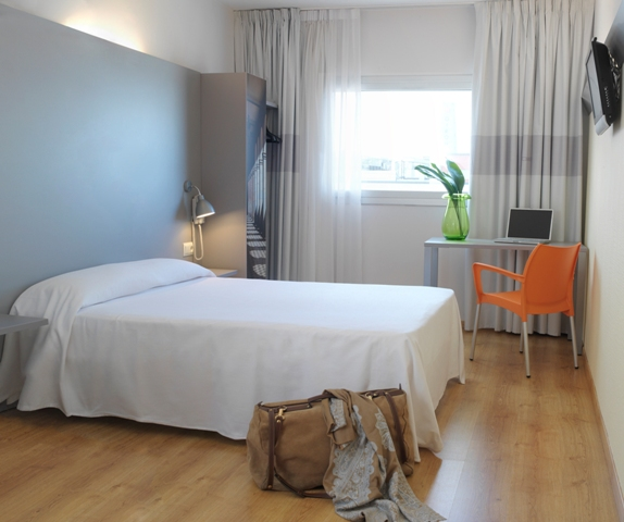 Habitacion Sidorme